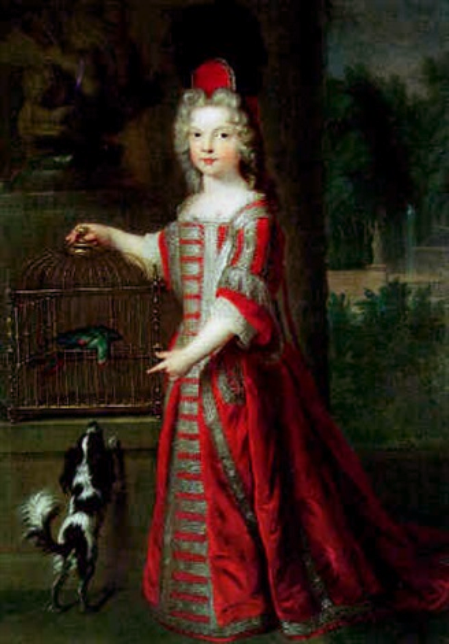 Portrait du Duc de Berry, en habit de mascarade